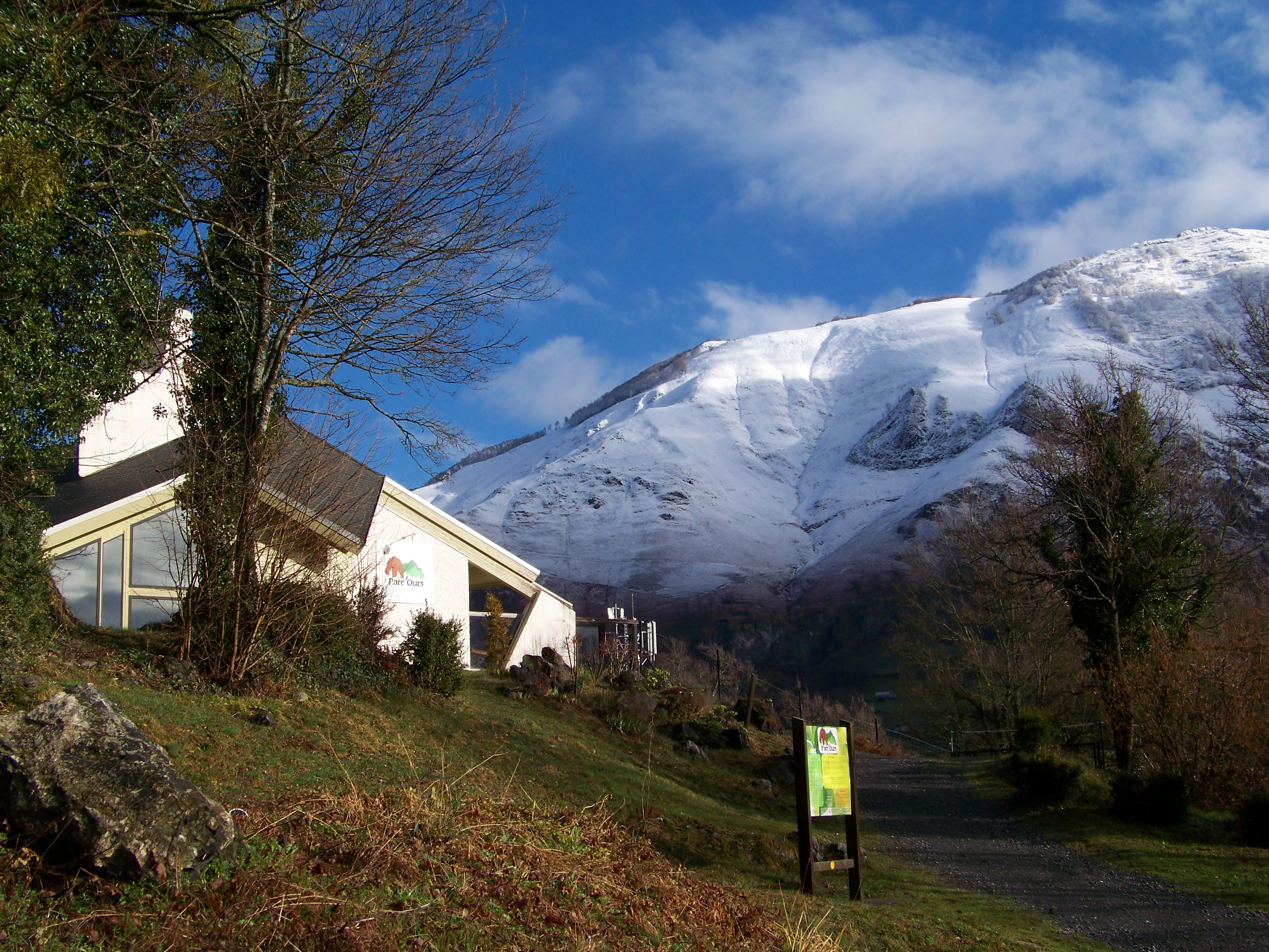 Photographie de l'entrée de l'espace animalier de Borce